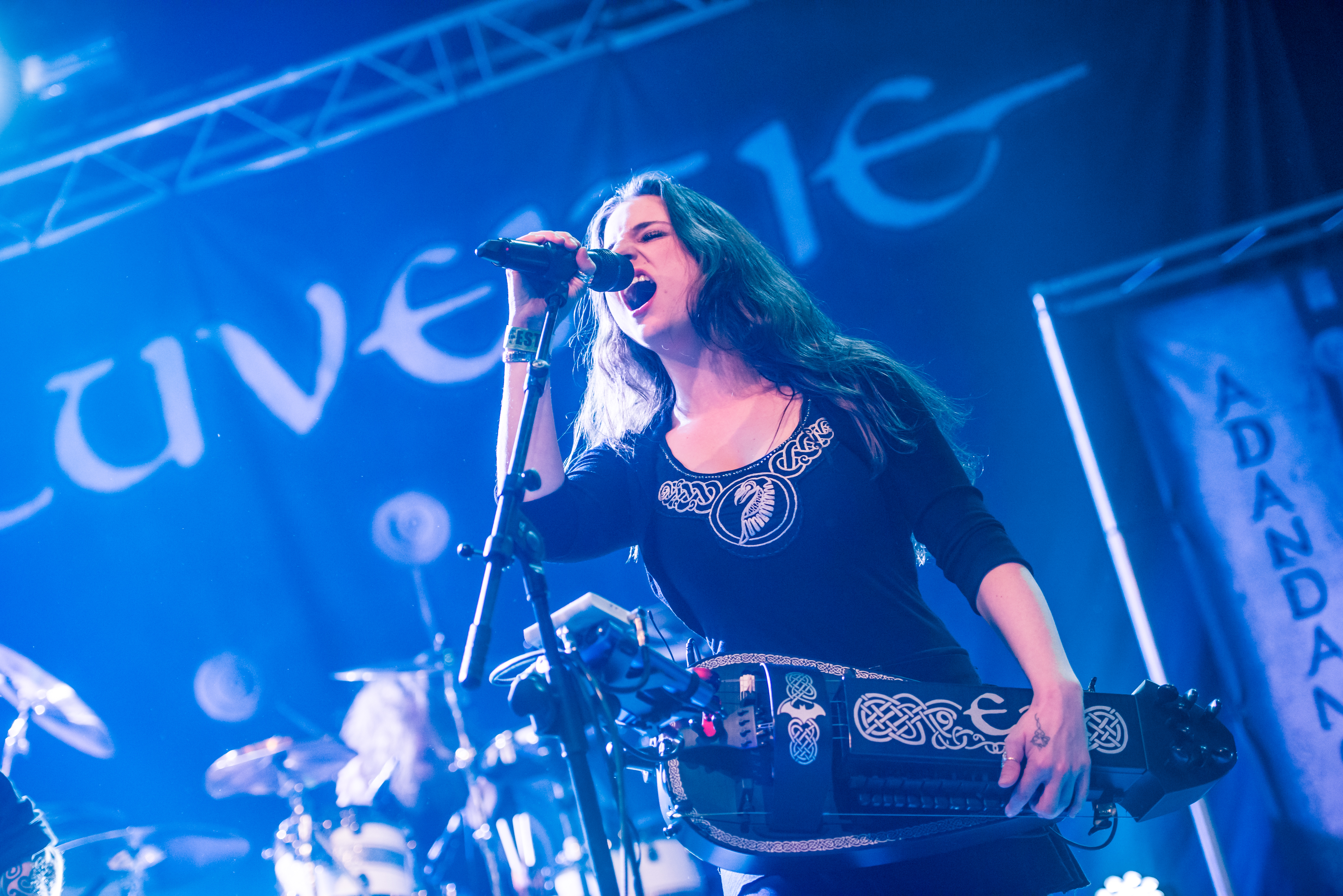 'Eluveitie - Epic Metal Fest - Eindhoven'